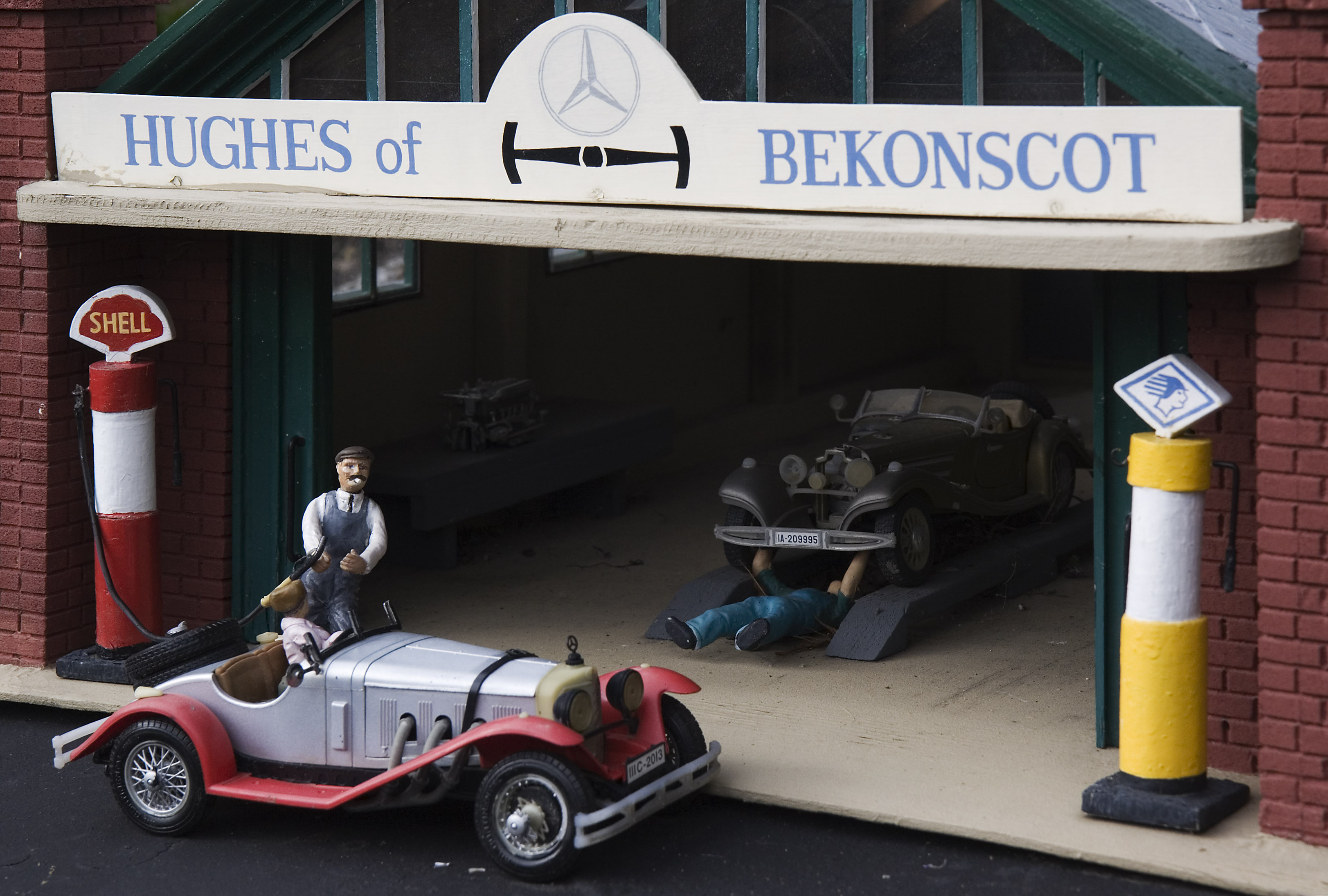 Motor garage, Bekonscot